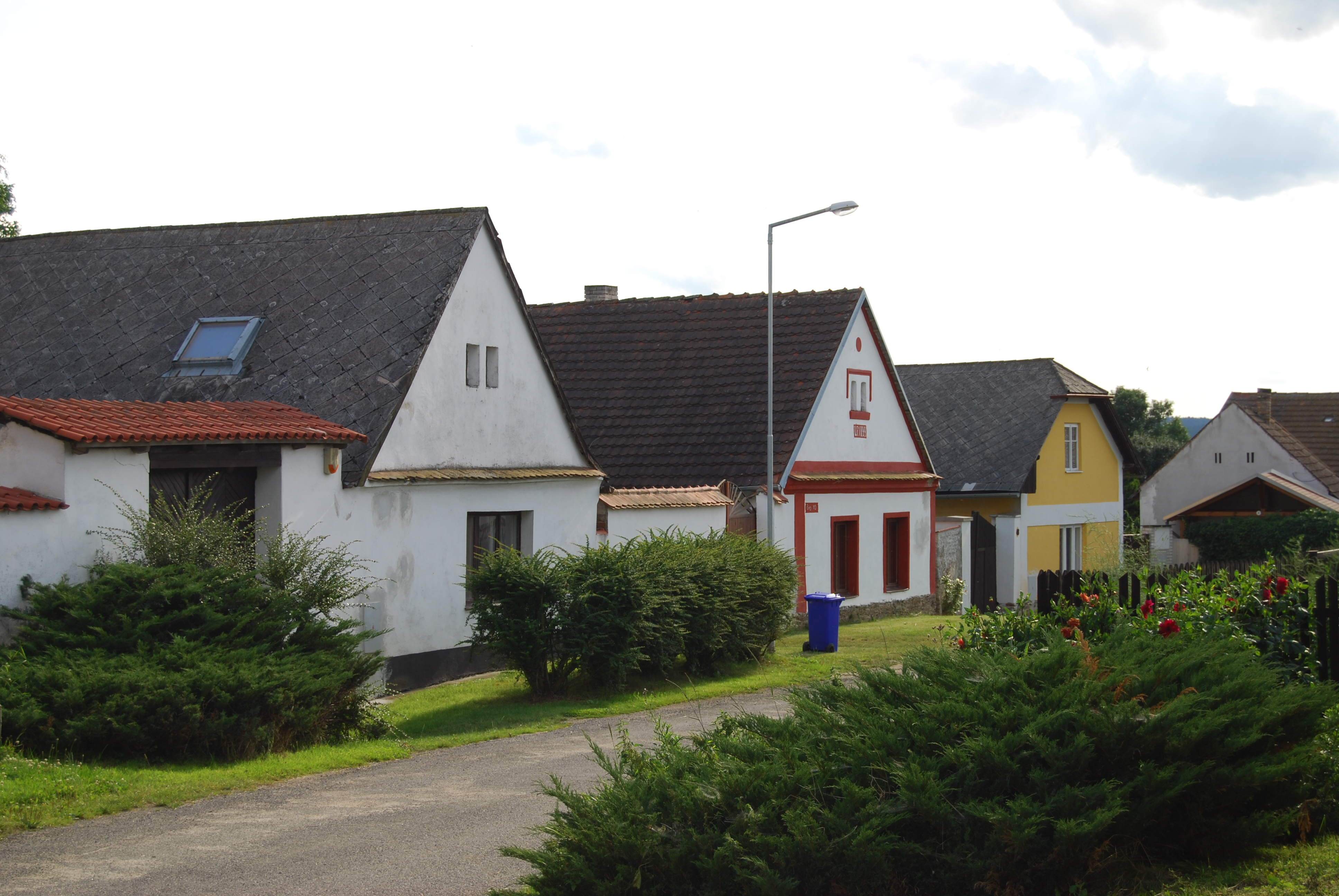 Pohled na část obce. Jestřebice je část obce Bernartice v okrese Písek. Česká republika.